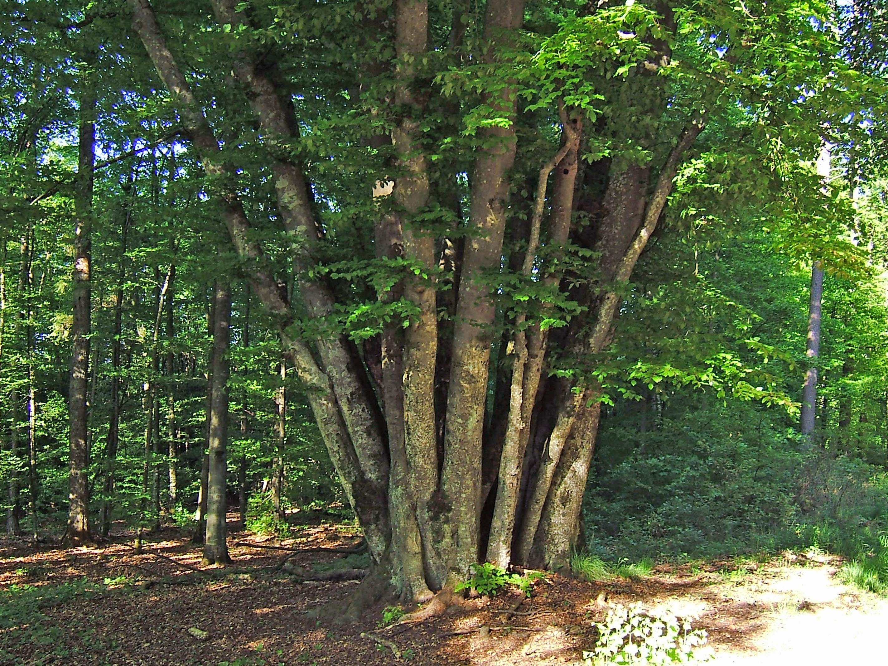 24 Buchen im Herrenberger Stadtwald des Schönbuchs